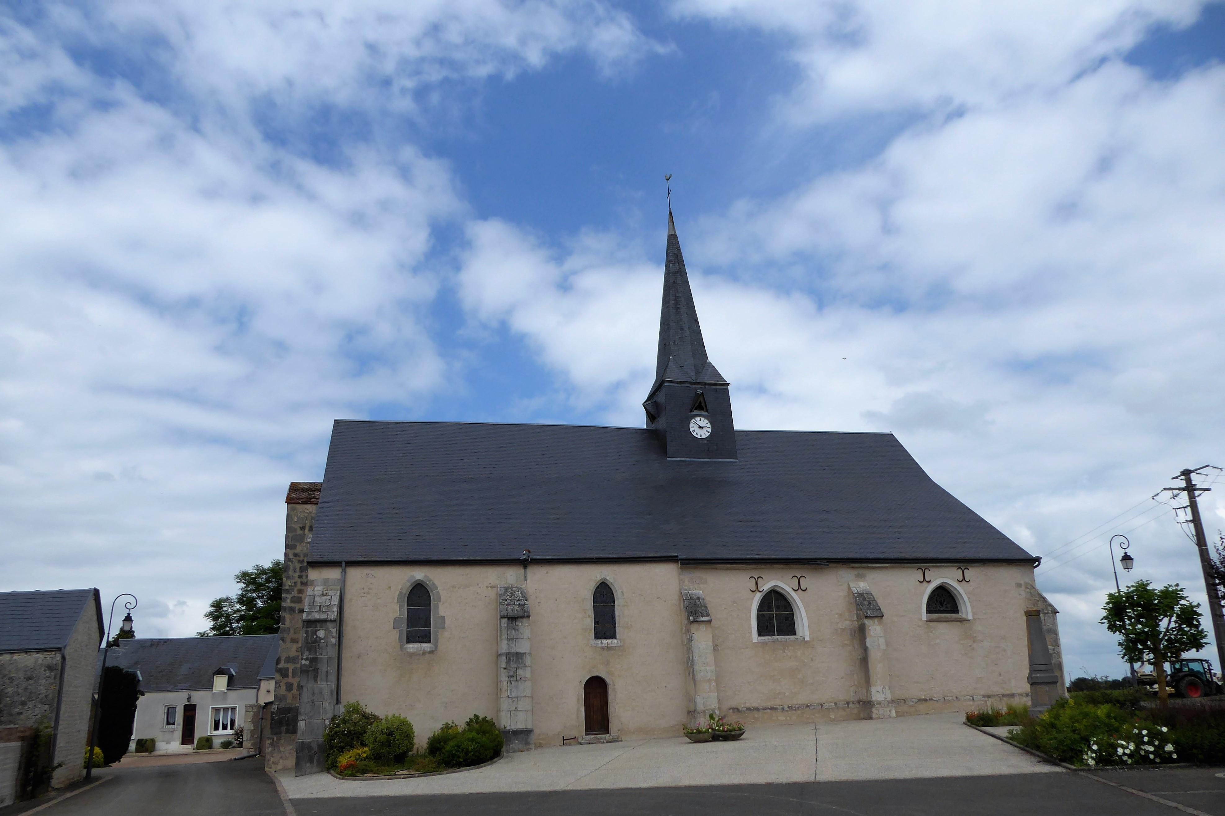 mur sud de l'église Sainte Croix, Baigneaux, Eure-et-Loir, France.